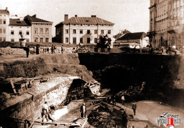 Перенос русла и перекрытие Полтвы перед строительством Оперного театра. Львов, 1888 год.